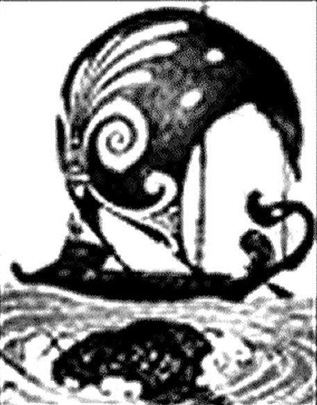 charybdis